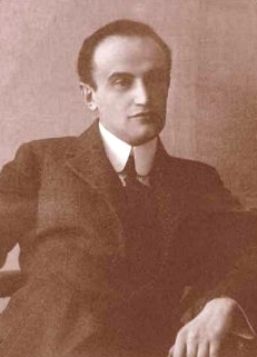 Hatvany Lajos író, kritikus, irodalomtörténész, Kossuth-díjas, az Magyar Tudományos Akadémia tagja.